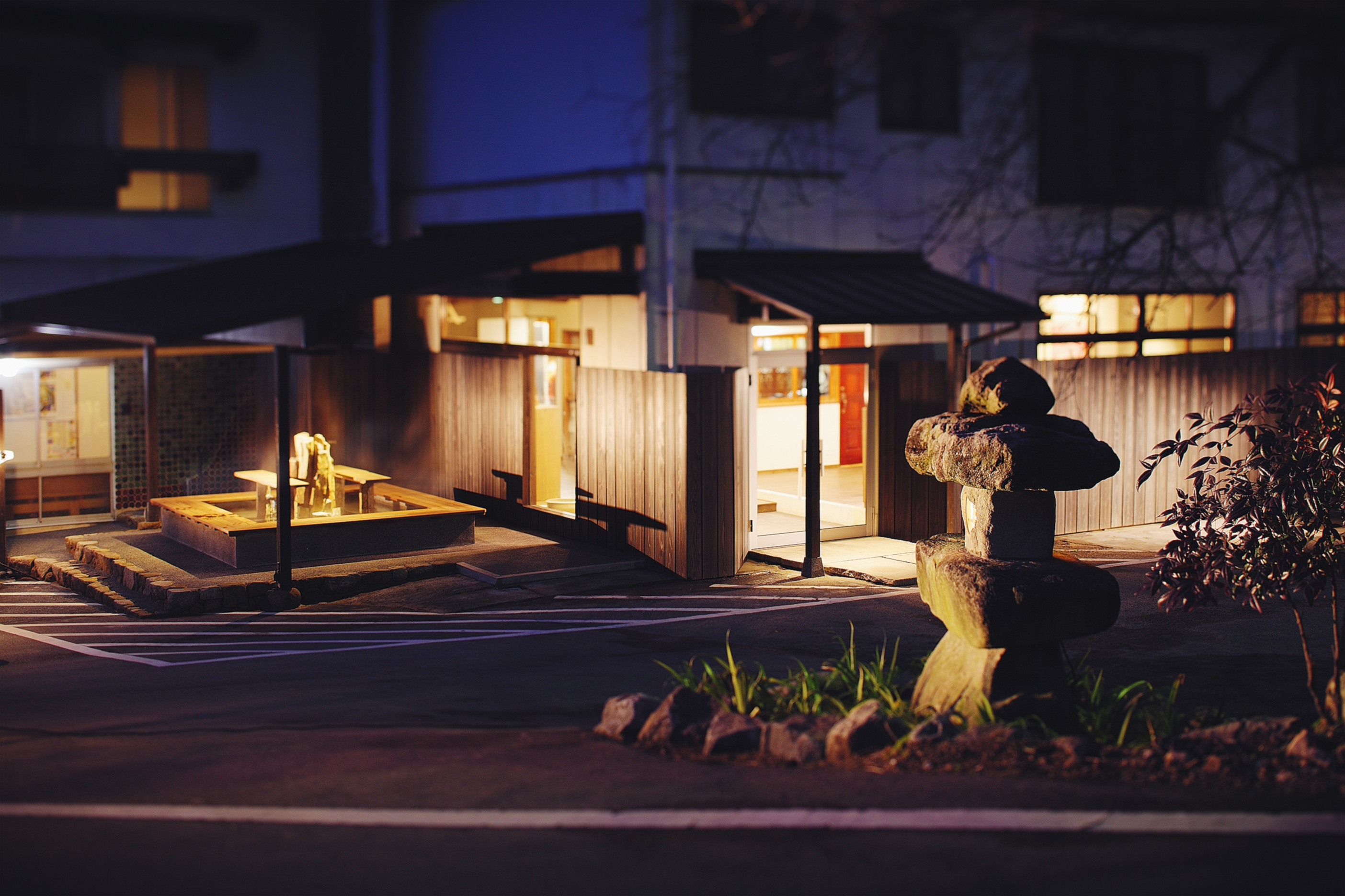 湯之谷温泉外観 (愛媛県)